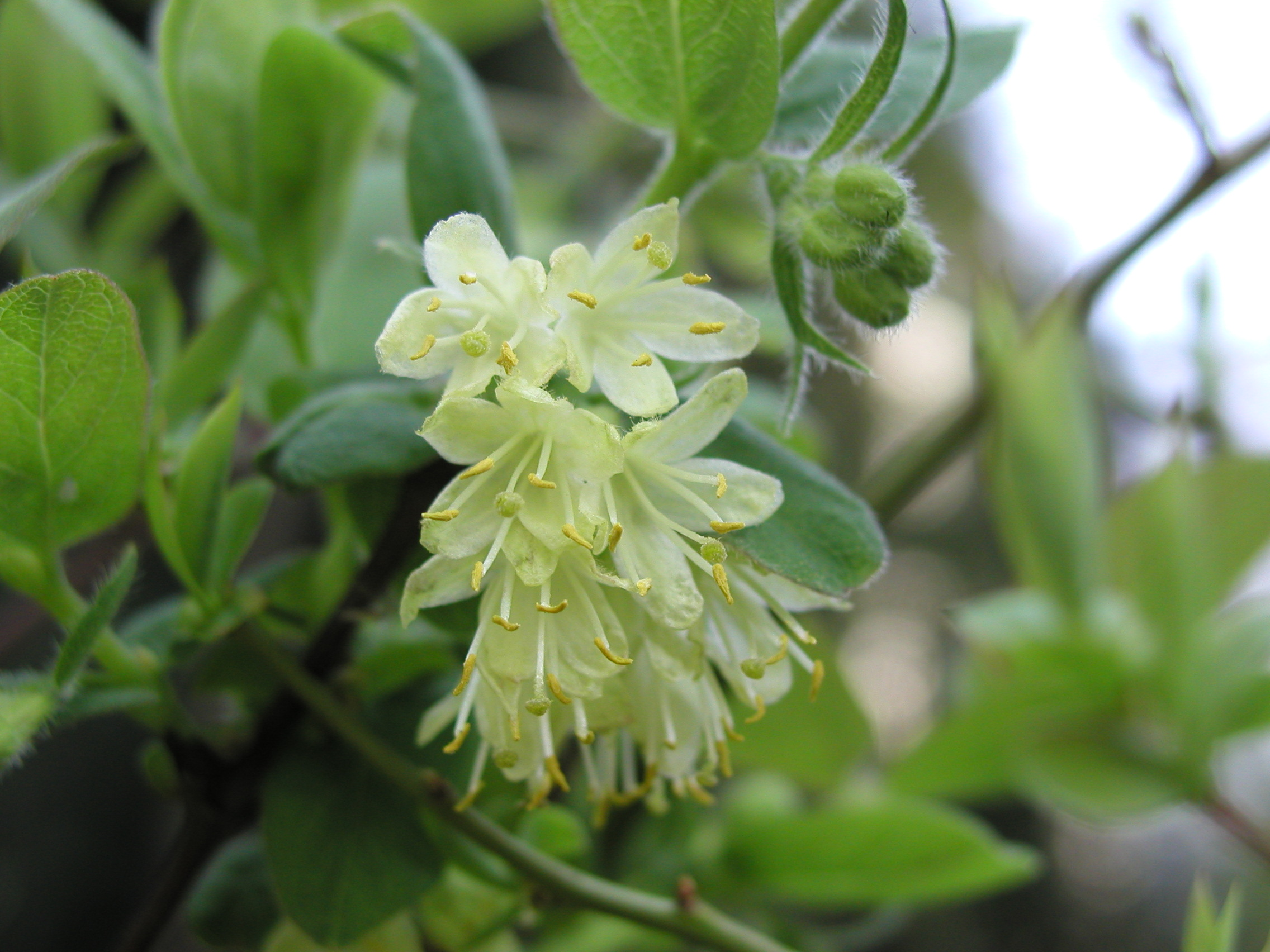 Jagoda kamczacka Lonicera caerulea